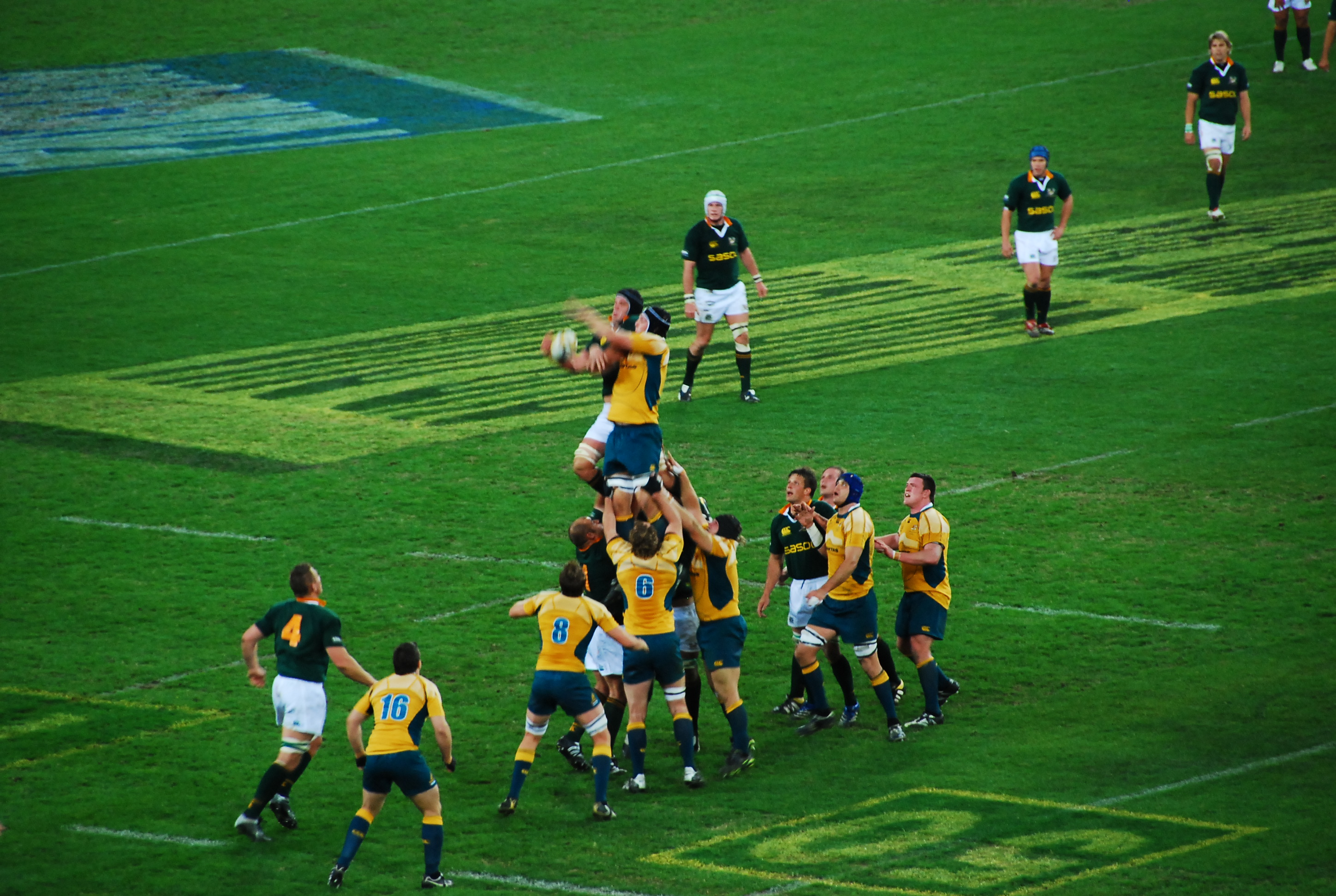 'n Lynstaan tydens die Drie-Nasie wedstryd tussen die Wallabies en die Springbokke op 7 Julie 2007.